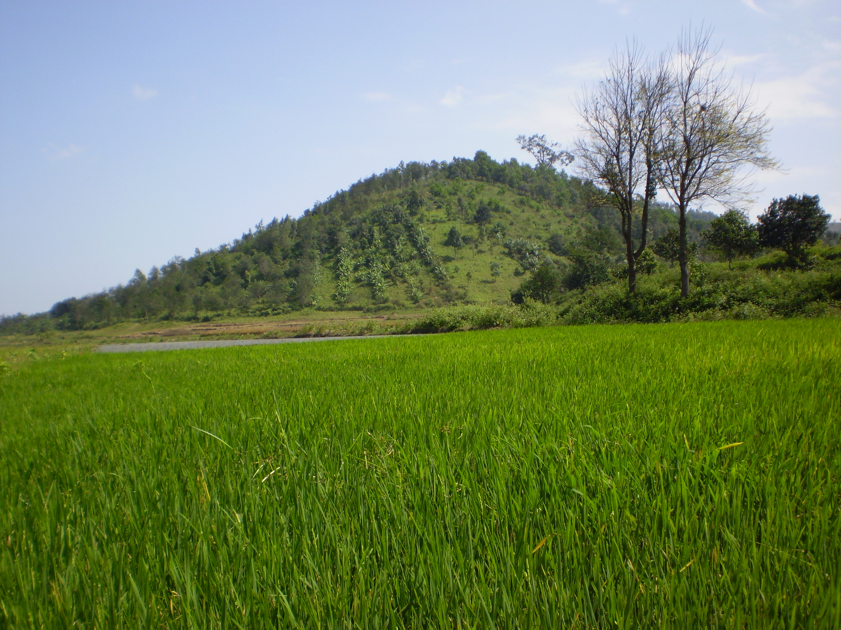 Một cánh đồng lúa nước ở huyện Cư Kuin, Đăk Lăk. Hình do thành viên:Danvanhong tự chụp và truyền lên Wikipedia